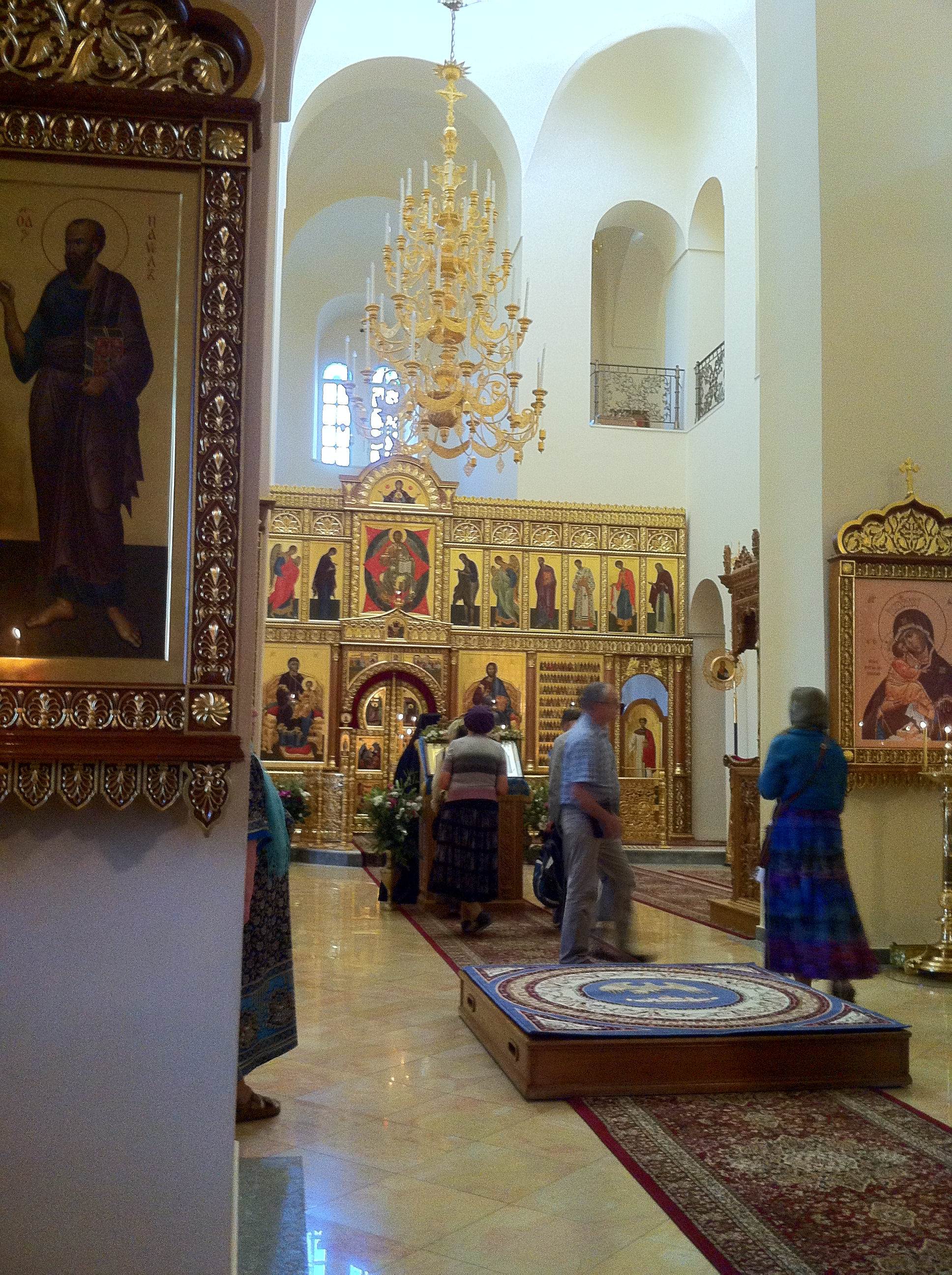 מנזר גורני (או גורננסקי), המוכר גם בשמו הערבי מוסקוביה, הוא מנזר בו מתגוררות נזירות רוסיות אורתודוקסיות. בתחילה שימש כאכסניית צליינים. ב-1911 יזמה הנסיכה אליזבת, אשתו של מושל מוסקבה, את בניית "כנסיית כל הקדושים של רוסיה". בנייתה הופסקה במלחמת העולם ה-I, והתחדשה רק ב-2003. הכנסייה בסגנון רוסי עם צריחי "בצל", וב-2009 כיפותיה צופו זהב.